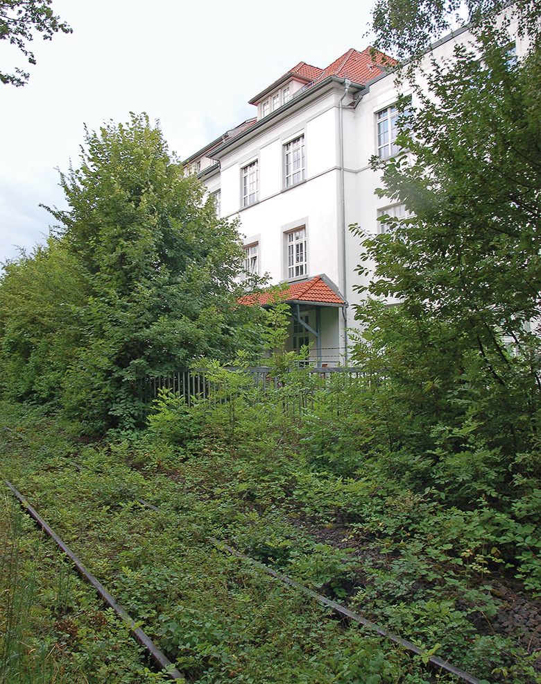 Ehemaliger Haltepunkt Osterholz (von Nordosten)